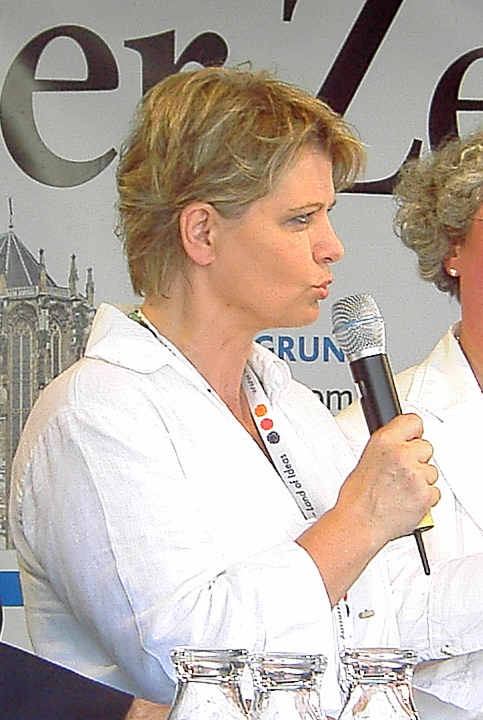 Andrea Spatzek während eines öffentlichen Auftritts beim CHIO 2009 in Aachen